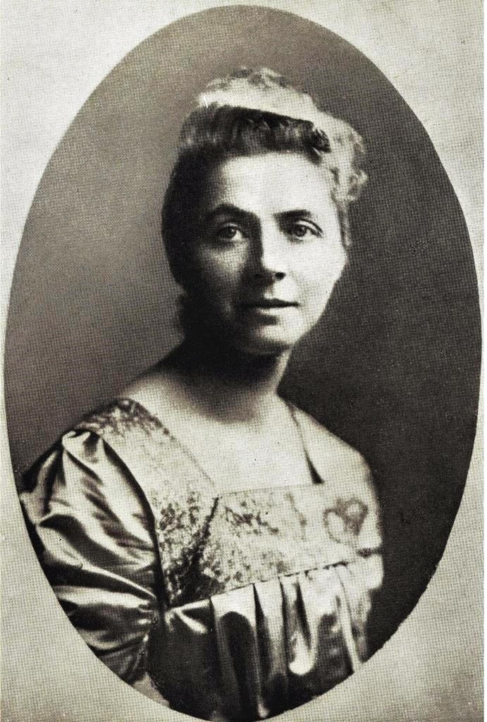 En 1916 la intrépida activista de derechos humanos Emily Hobhouse viajó a Francia, luego a la Suiza neutral y de allí a Berlín, adonde fue a rendir visita al ministro de Exteriores alemán, al que había conocido antes de la guerra. Con él discutió las posibles condiciones de paz, y trajo a su vuelta algunas ideas sobre este particular en las que trató de interesar al gobierno británico. Aunque su misión de loba solitaria ayudó a promover el intercambio de civiles internados, los funcionarios británicos se apresuraron a despacharla como una subversiva excéntrica (Adam Hochschild).